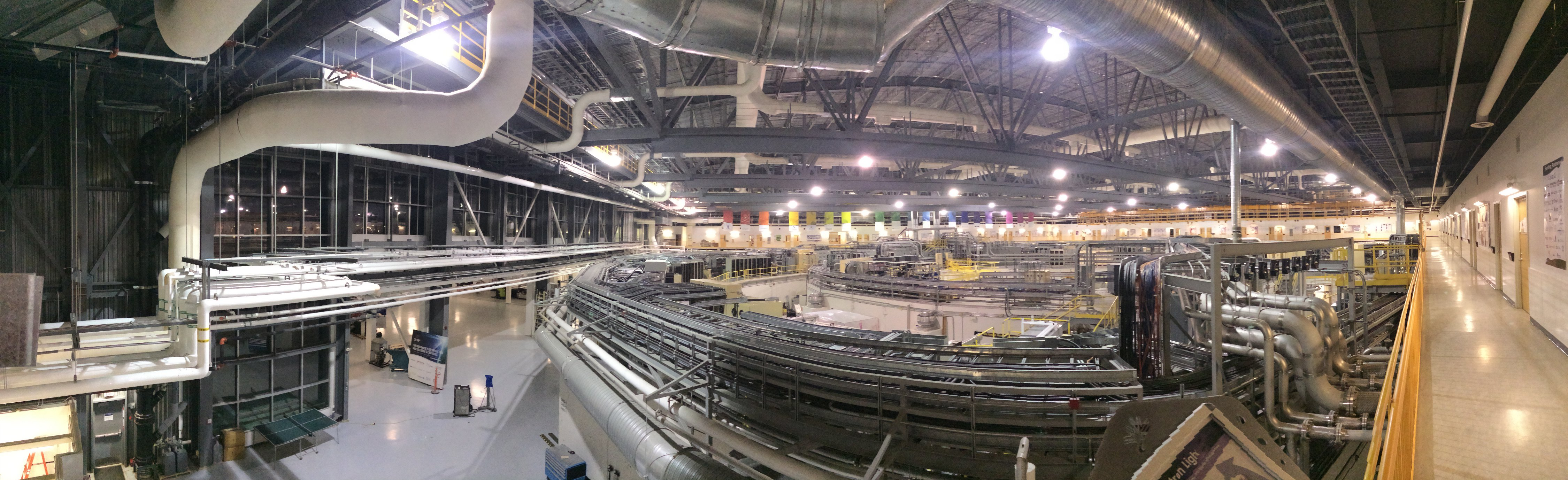 NW Mezzanine night panorama